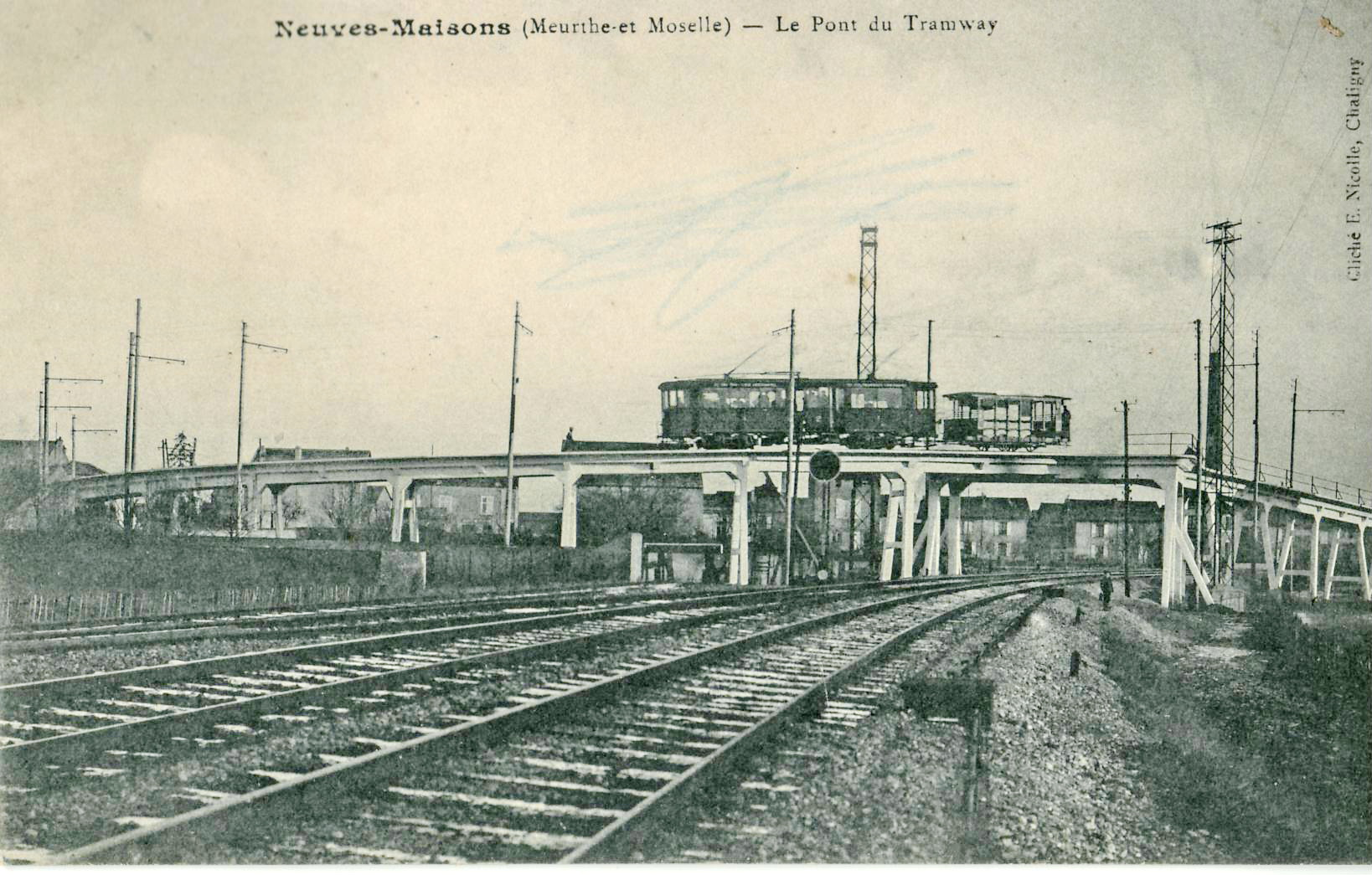 Carte postale ancienne éditée par E. Nicolle à Chaligny : NEUVES-MAISONS - Le Pont du Tramway